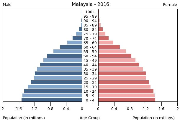 A population pyramid illustrates the age and sex structure of a country's population and may provide insights about political and social stability, as well as economic development. The population is distributed along the horizontal axis, with males shown on the left and females on the right. The male and female populations are broken down into 5-year age groups represented as horizontal bars along the vertical axis, with the youngest age groups at the bottom and the oldest at the top. The shape of the population pyramid gradually evolves over time based on fertility, mortality, and international migration trends.